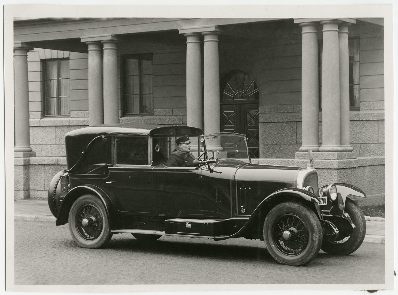 Voisin model C3 cabriolet